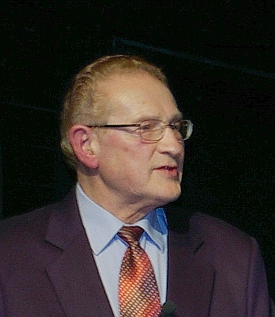 Percy Schmeiser at Forum3 in Stuttgart